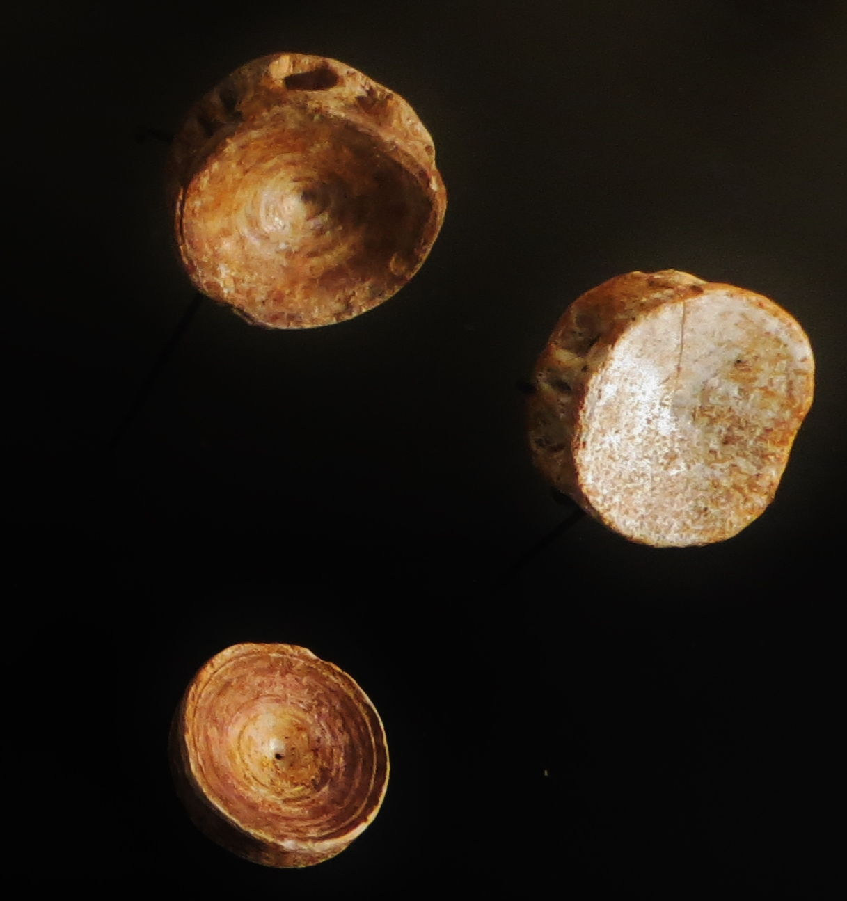 Fossil - Took the picture at Palazzo Dugnani, Milano